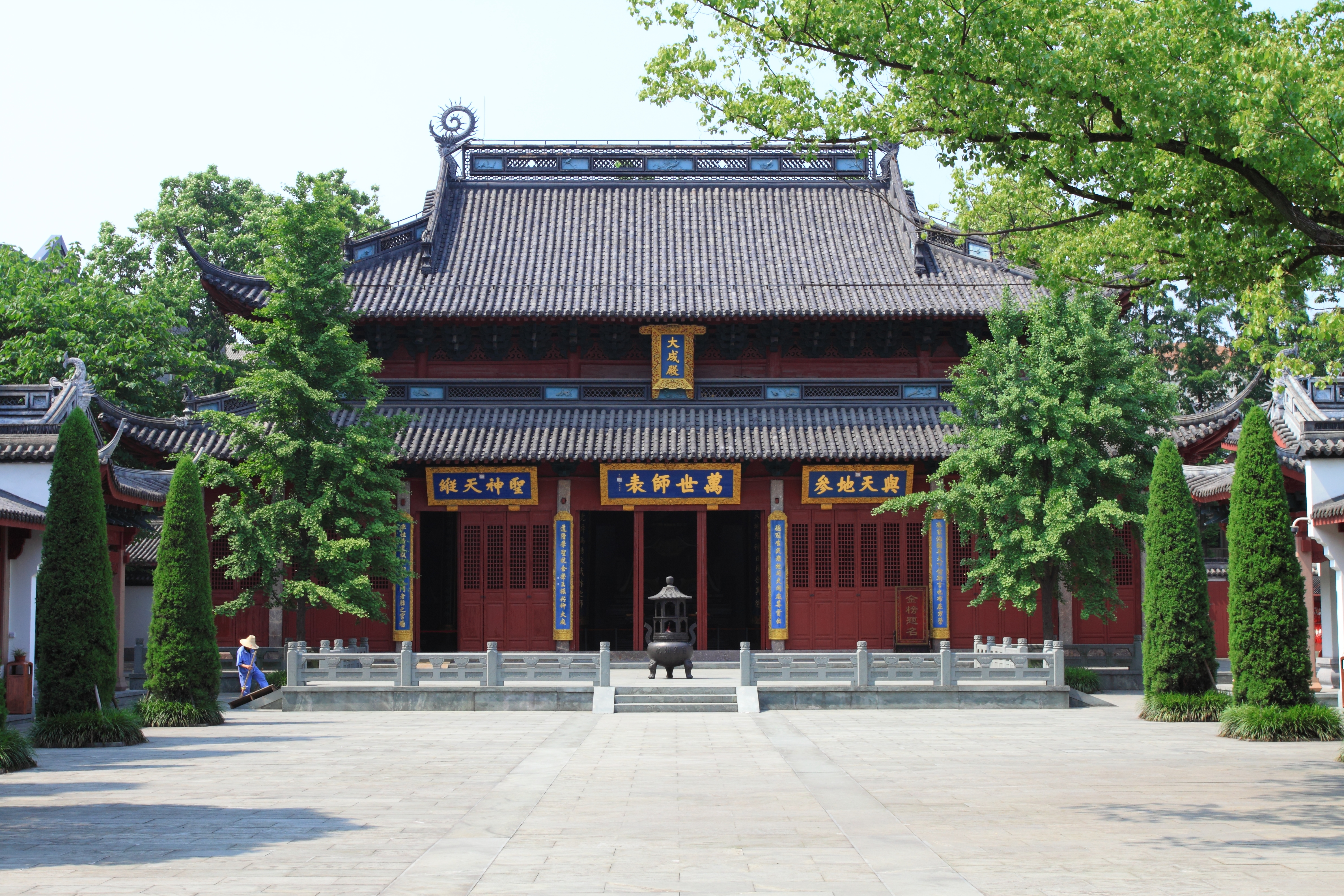 杭州孔庙大成殿（清代重建），位于中国浙江省杭州市。